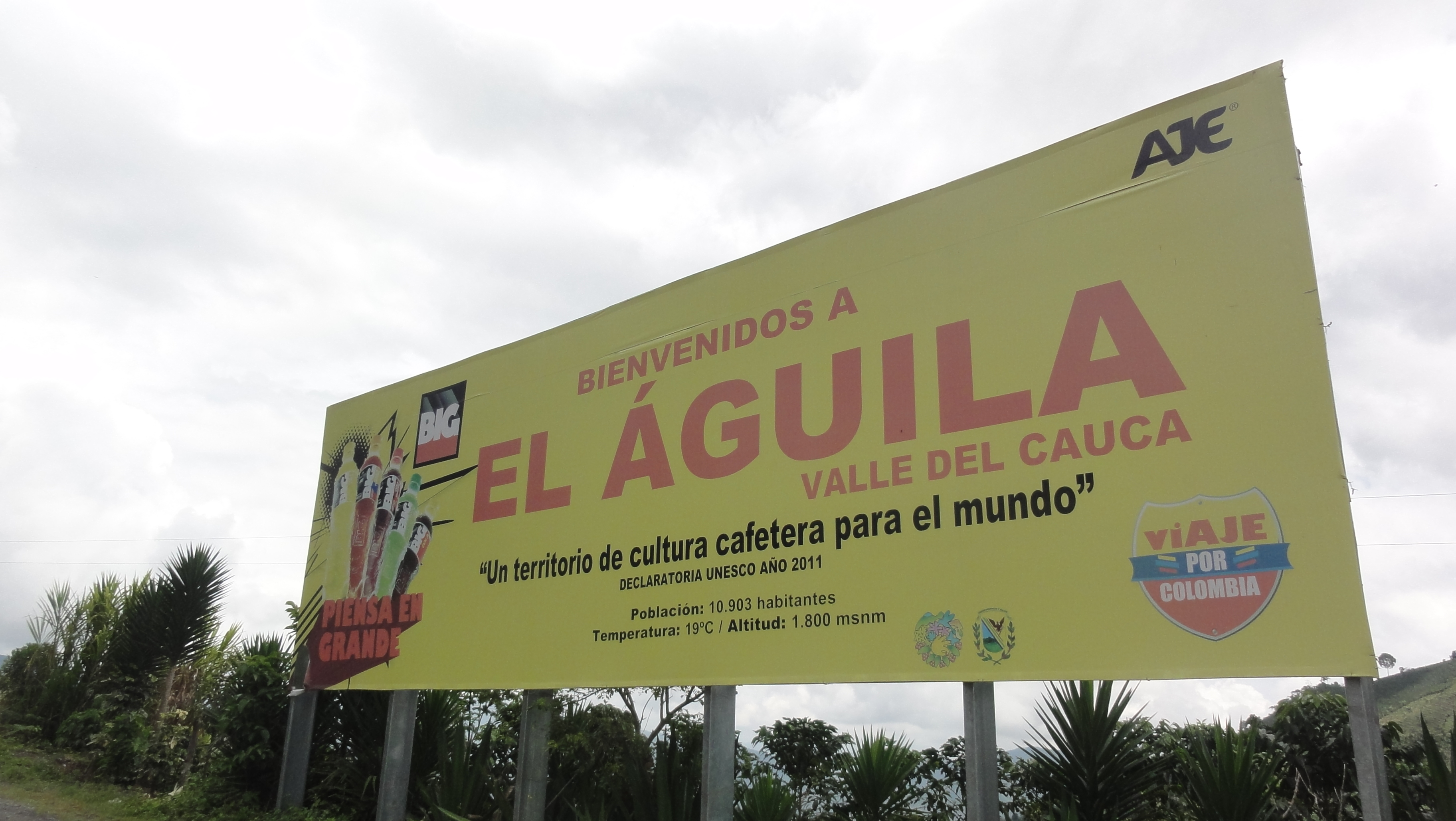 Vía Ansermanuevo a El Águila, cruce a la vereda Santa Helena (Granario), aproximadamente a 2 Km al suroeste del parque principal de El Águila. El Águila, Valle del Cauca, Colombia.